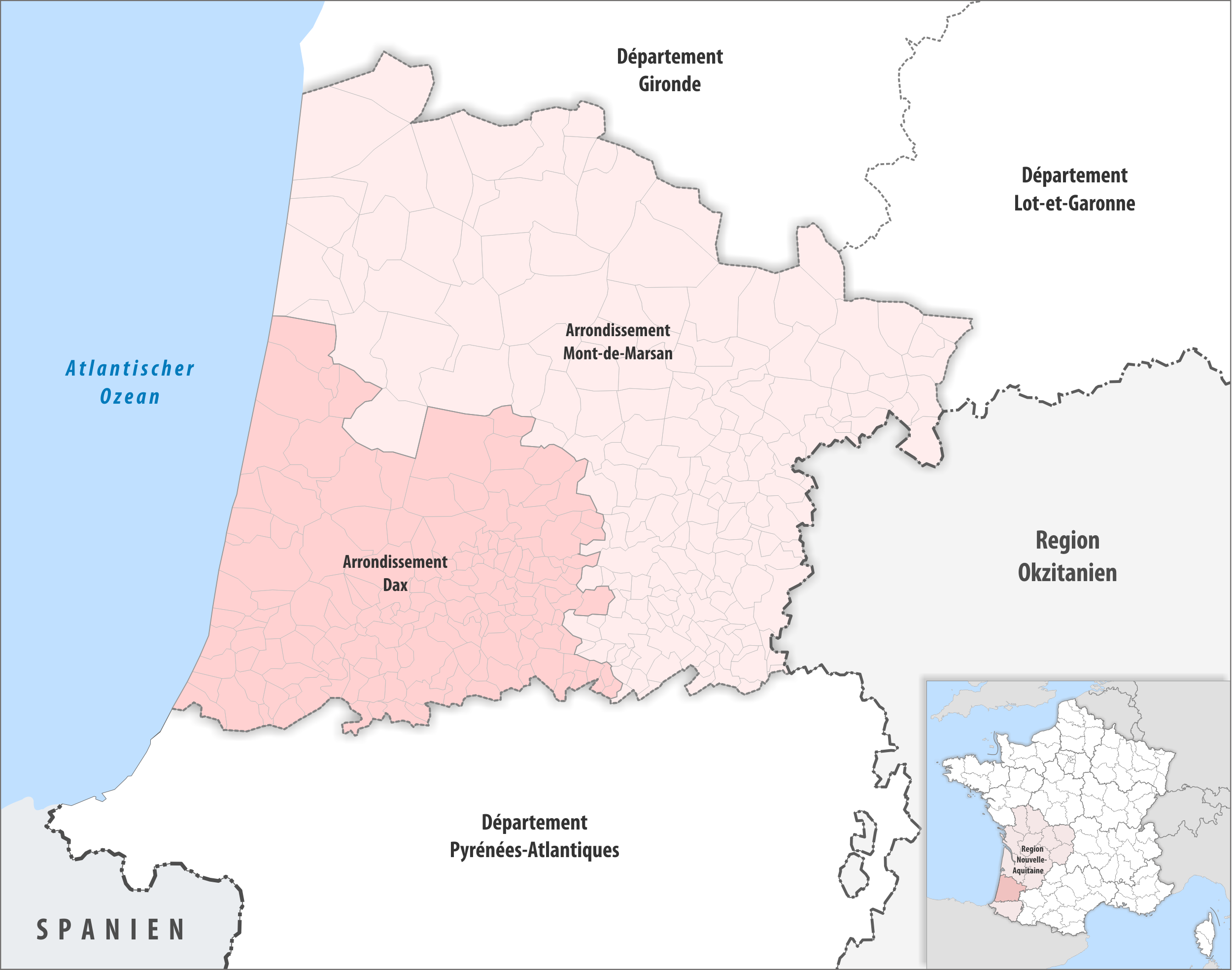 Gemeinden und Arrondissemente im Departement Landes